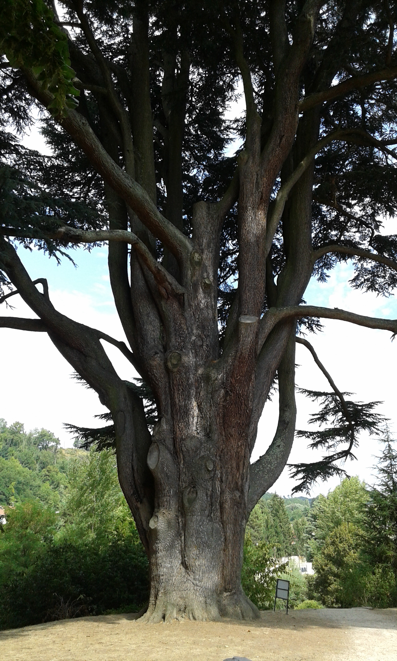 Cèdre du Liban, remarquable par son âge et sa taille, situé dans le parc du château d'Hauterives (Drôme)